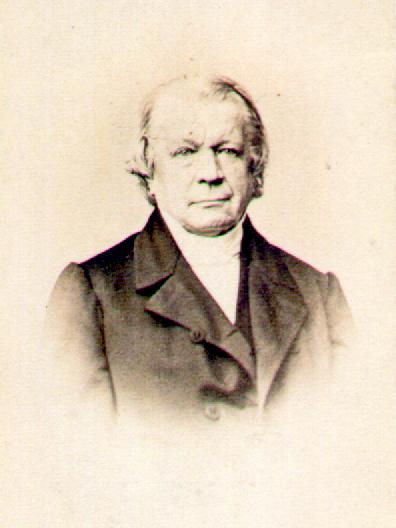 Portrait-Foto Friedrich Wilhelm Krummacher, ca. 1860